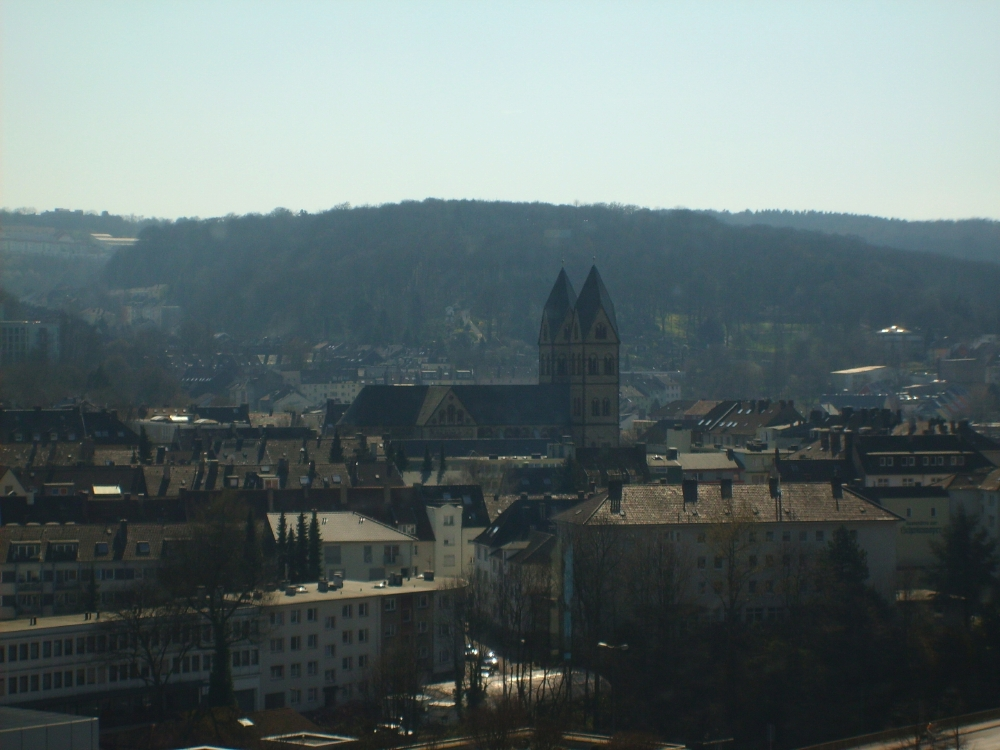 Sankt Suitbertus in Wuppertal über den Dächern der Elberfelder Südstadt